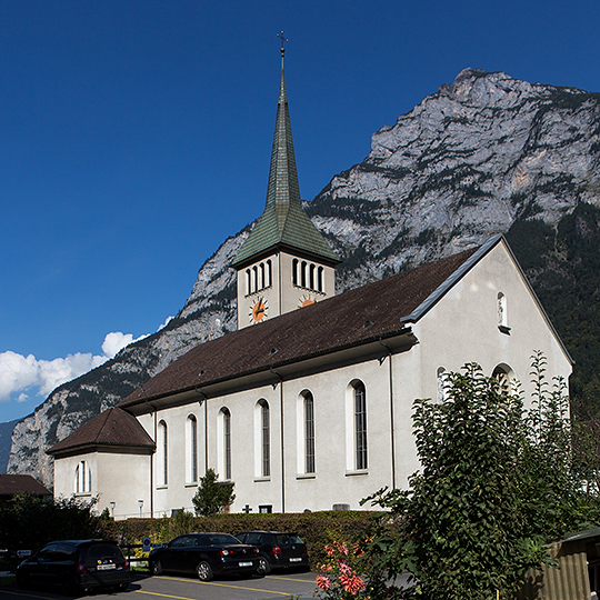 Pfarrkirche in Erstfeld (UR)